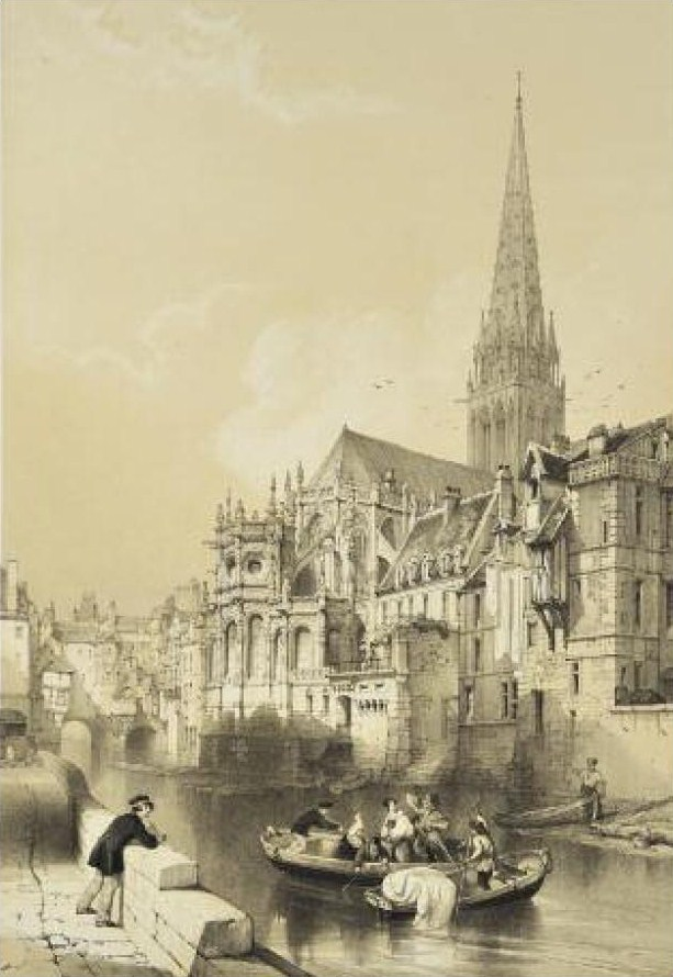 Chevet de l'église Saint-Pierre de Caen sur l'Odon